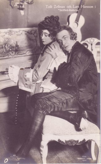 Tollie Zellman som Stövlett-Kathrine och Lars Hanson som Kristian VII i Stövlette-Kathrine, 1917